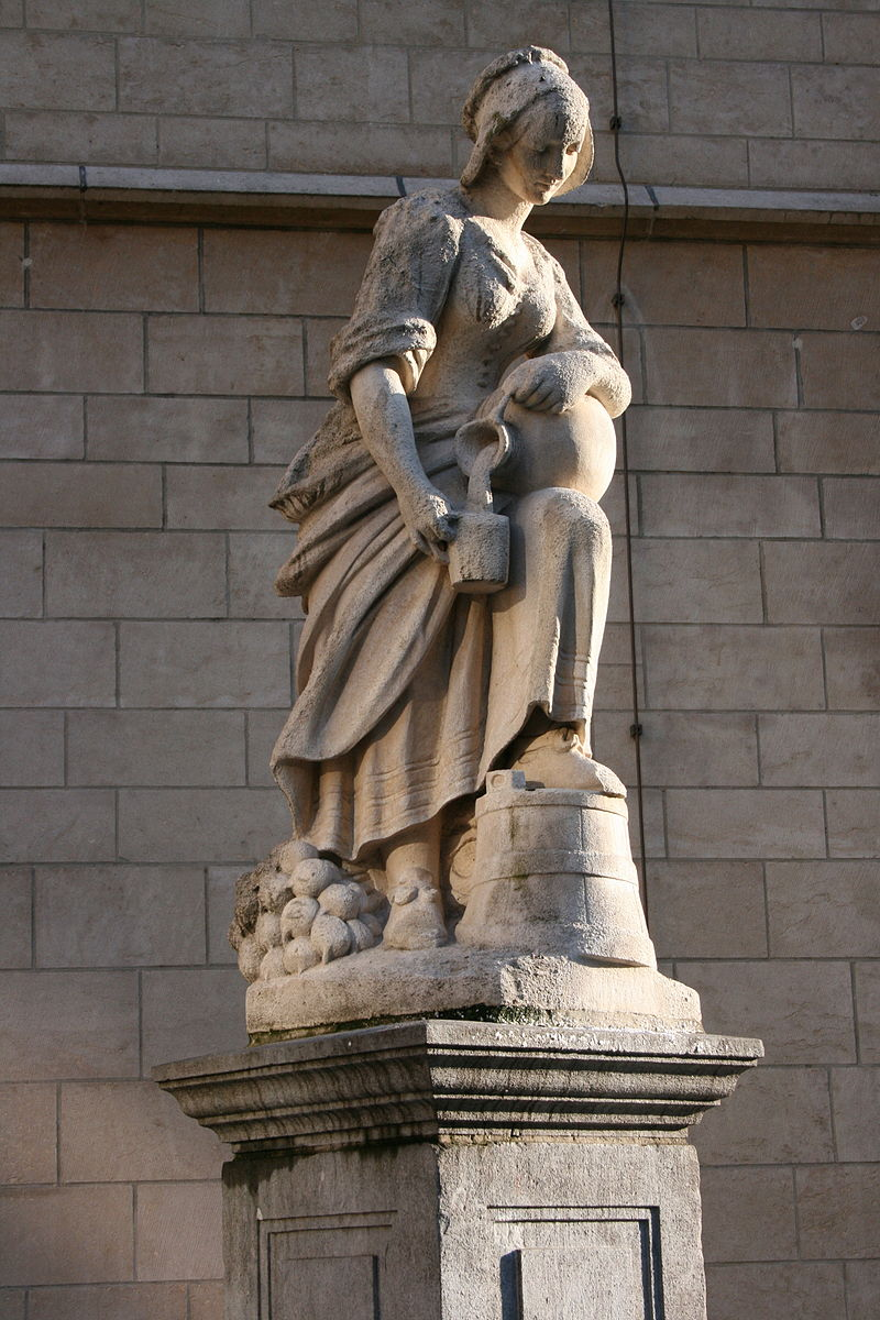 Dit is een foto van het Melkboerinnetje. Je kan zien dat ze op de arduinen sokkel staat, die ze kreeg tijdens het maken van de replica.